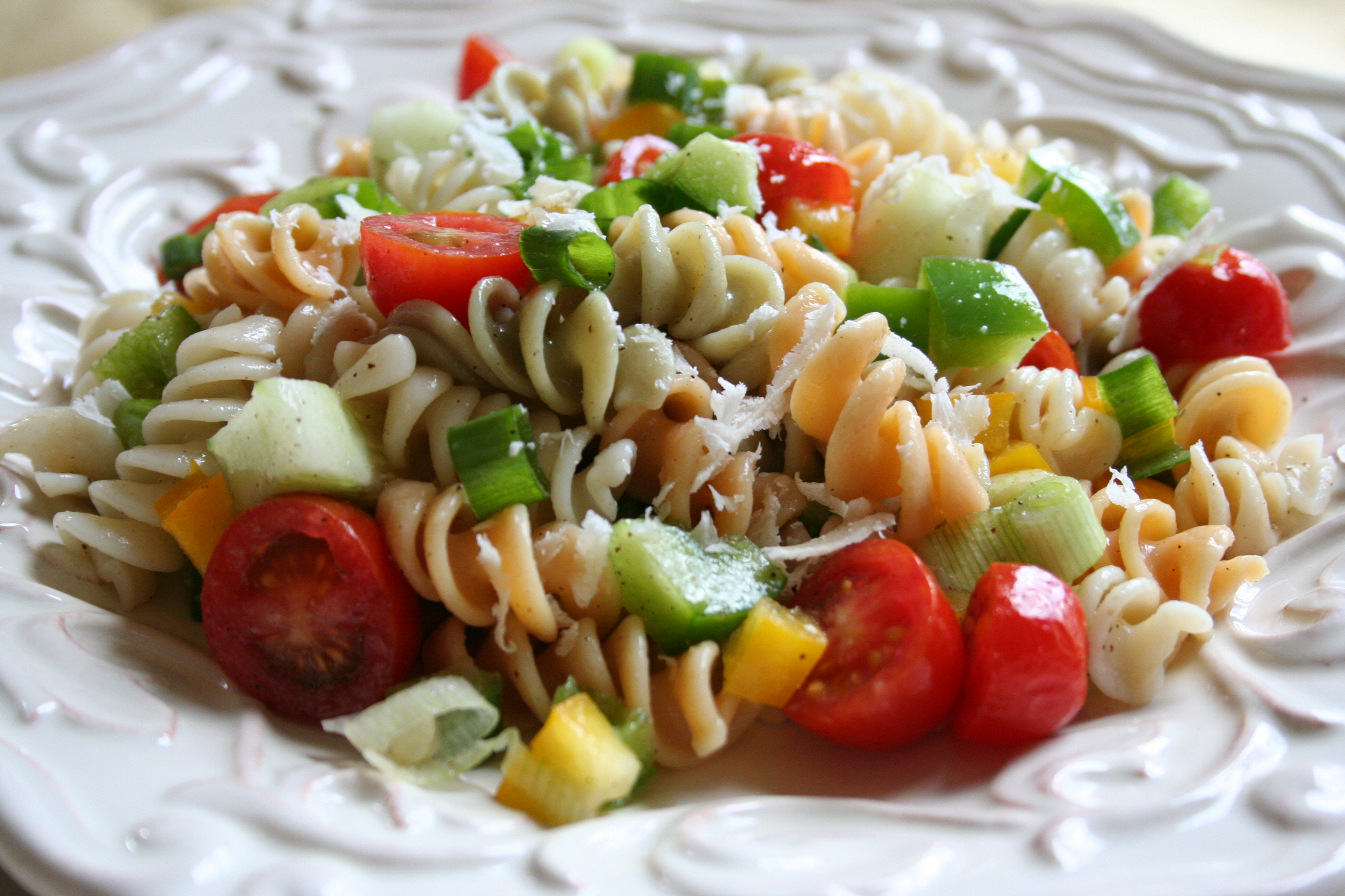 Pasta salad close-up.